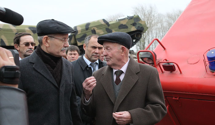 Рустэм Закиевич Хамитов, Президент Республики Башкортостан и Константин Владимирович Осколков, автор идеи и главный конструктор двухзвенных транспортёров семейства «Витязь» возле завода ИЗТМ